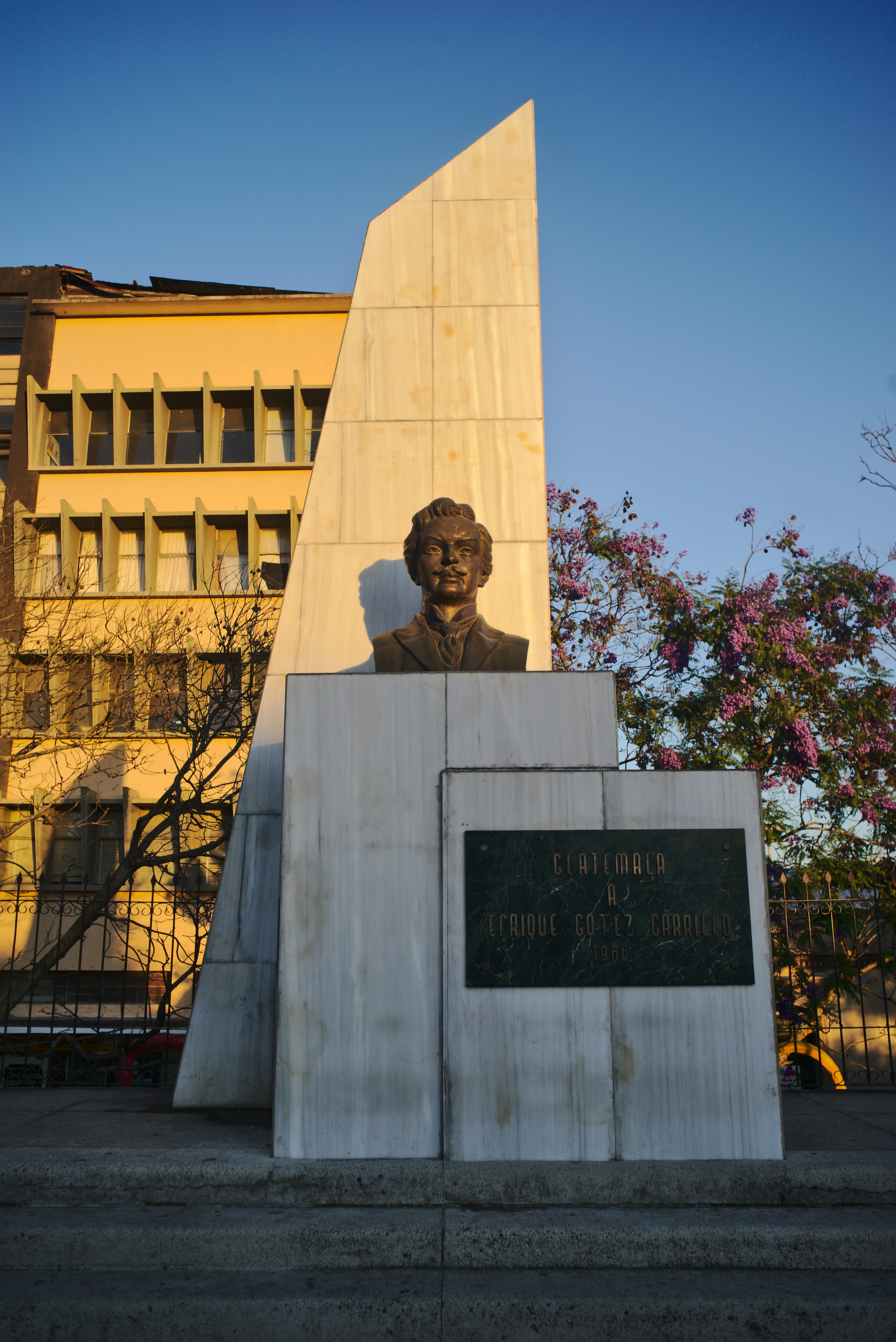 Busto de Enrique Gomez Carrillo, en el Parque La Concordia, Ciudad De Guatemala